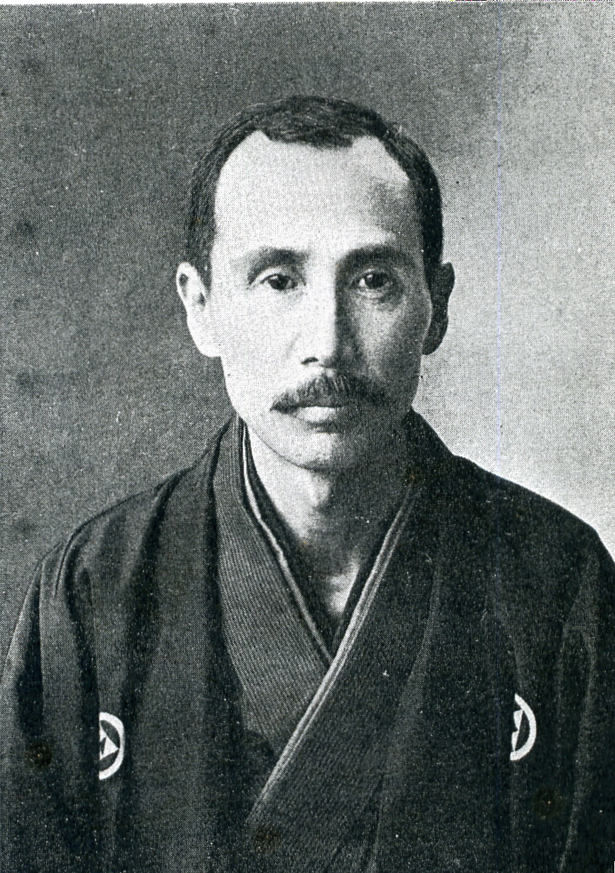 この写真は、石井次郎（1868-1939）の写真です。